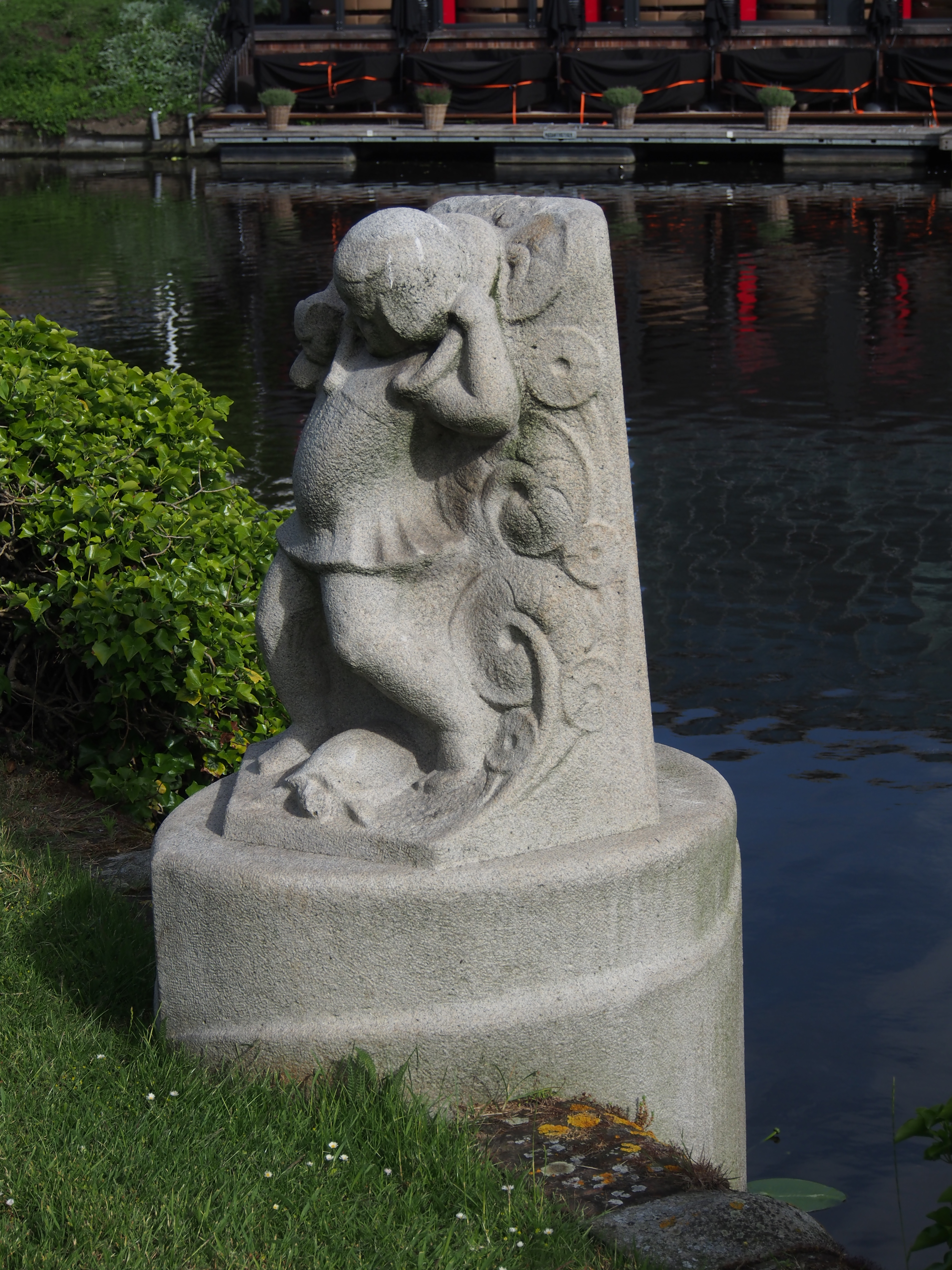 Photographed in Amsterdam, "Een meisje met een kat op haar schouder" van Loes Beijerman.